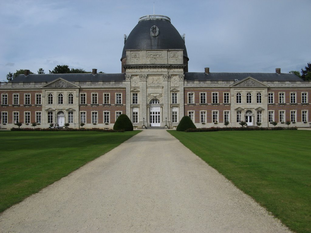 Chateau_d'Hélécine, Belgium